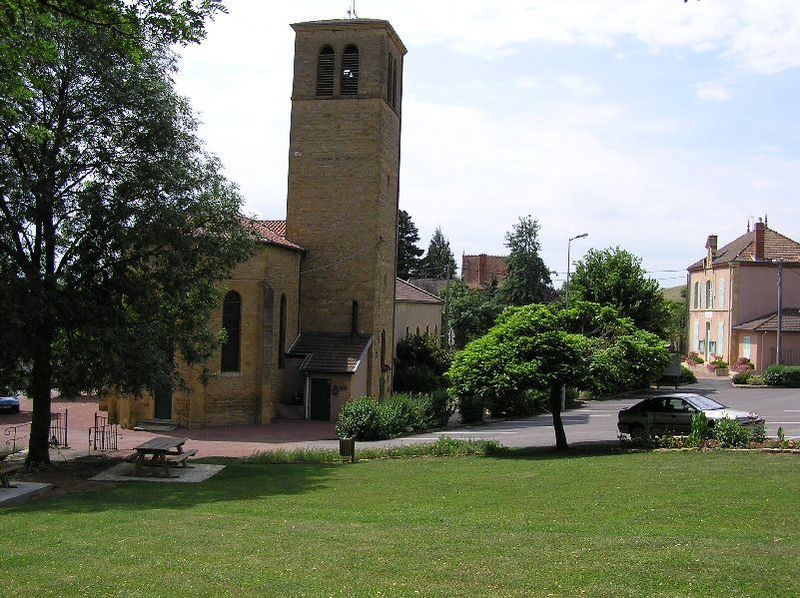 Le Bourg